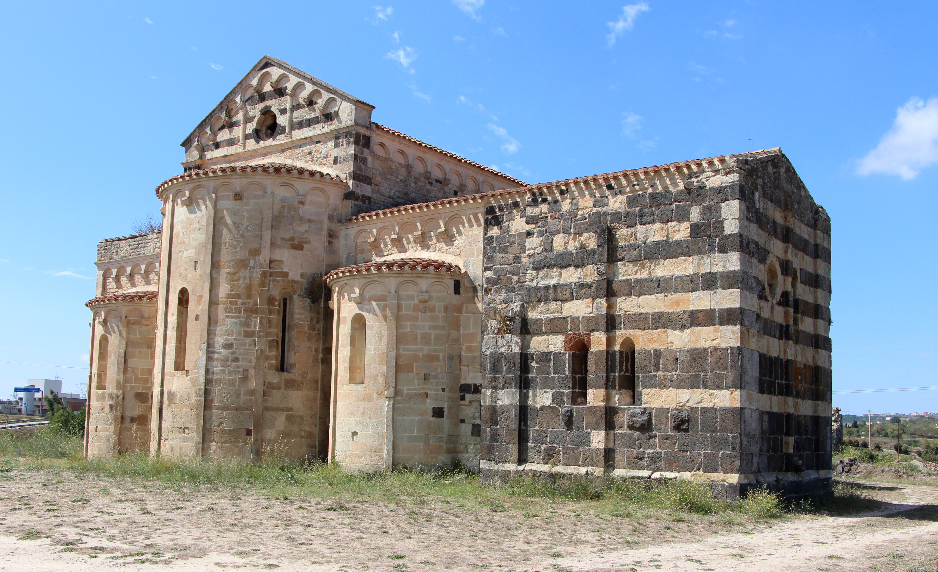 Ploaghe, SS